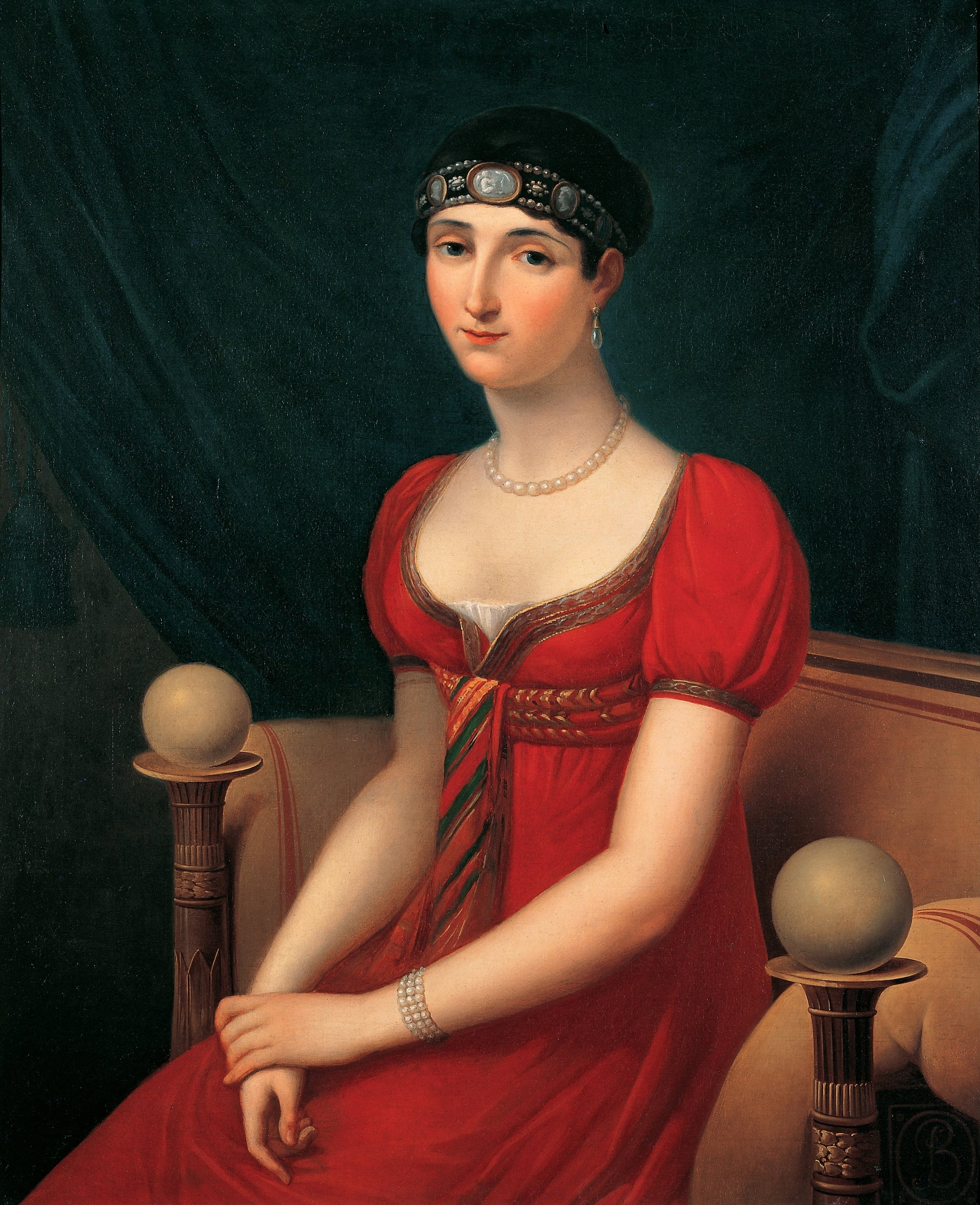 Pauline Bonaparte, principessa Borghese, duchessa di Guastalla, (1808)title QS:P1476,it:"Pauline Bonaparte, principessa Borghese, duchessa di Guastalla, (1808)" label QS:Lit,"Pauline Bonaparte, principessa Borghese, duchessa di Guastalla, (1808)"